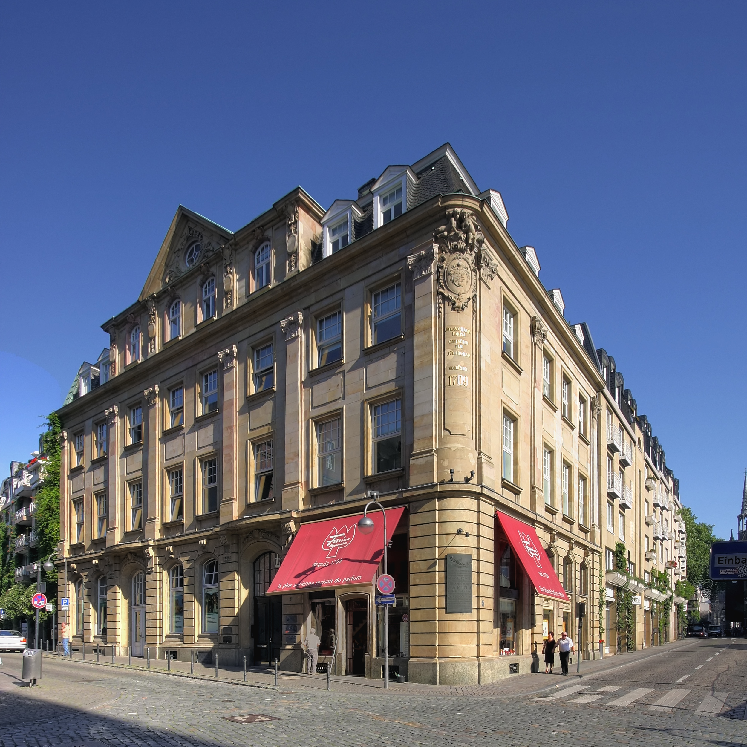 Farina-Haus, Obenmarspforten 21, Köln. Architekt: Emil Schreiterer und Bernhard Below, Baujahr: 1879-99. This is a photograph of an architectural monument.